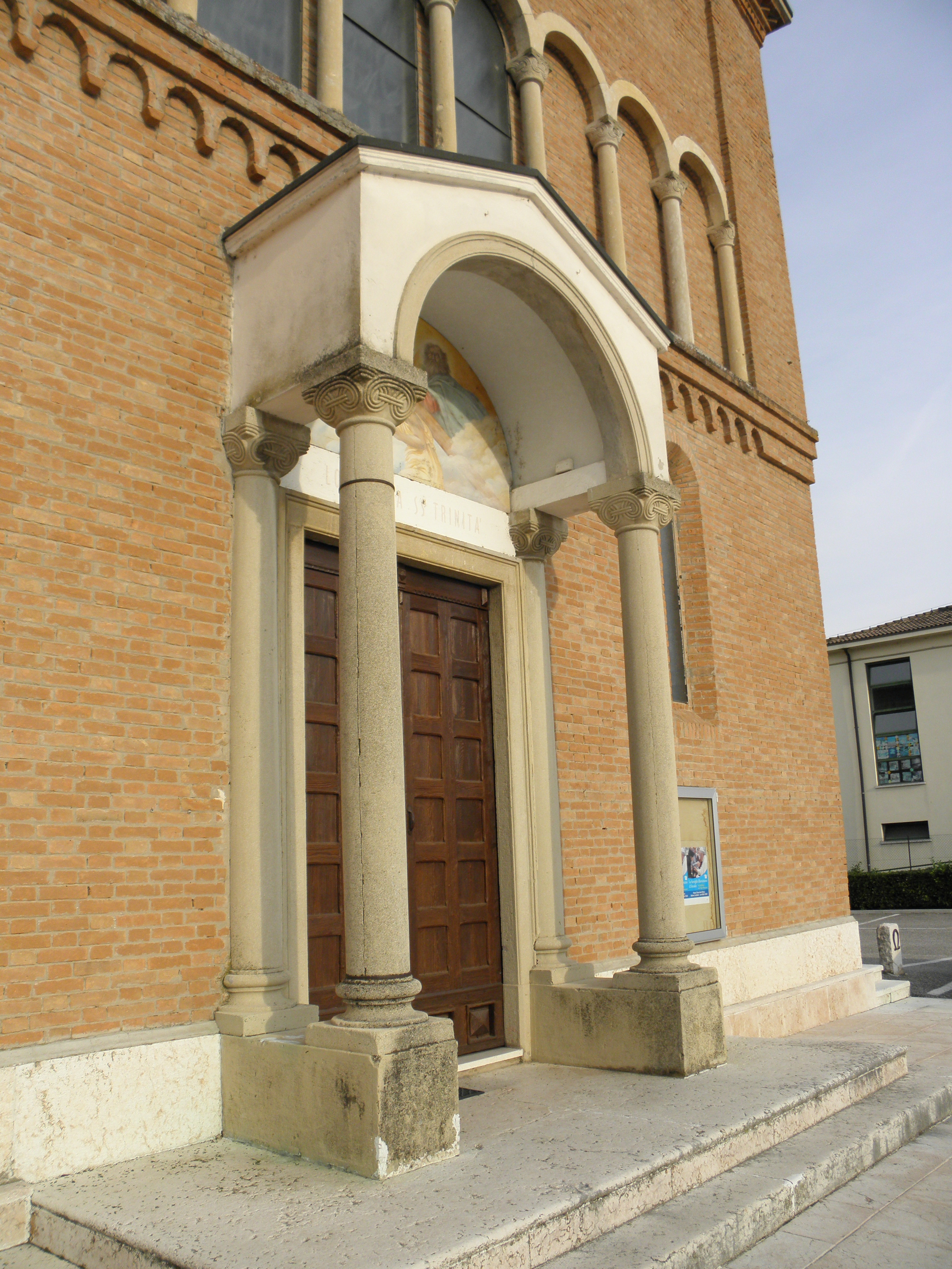 Volon, frazione di Zevio: il protiro della chiesa della Santissima Trinità e Madonna del Rosario.